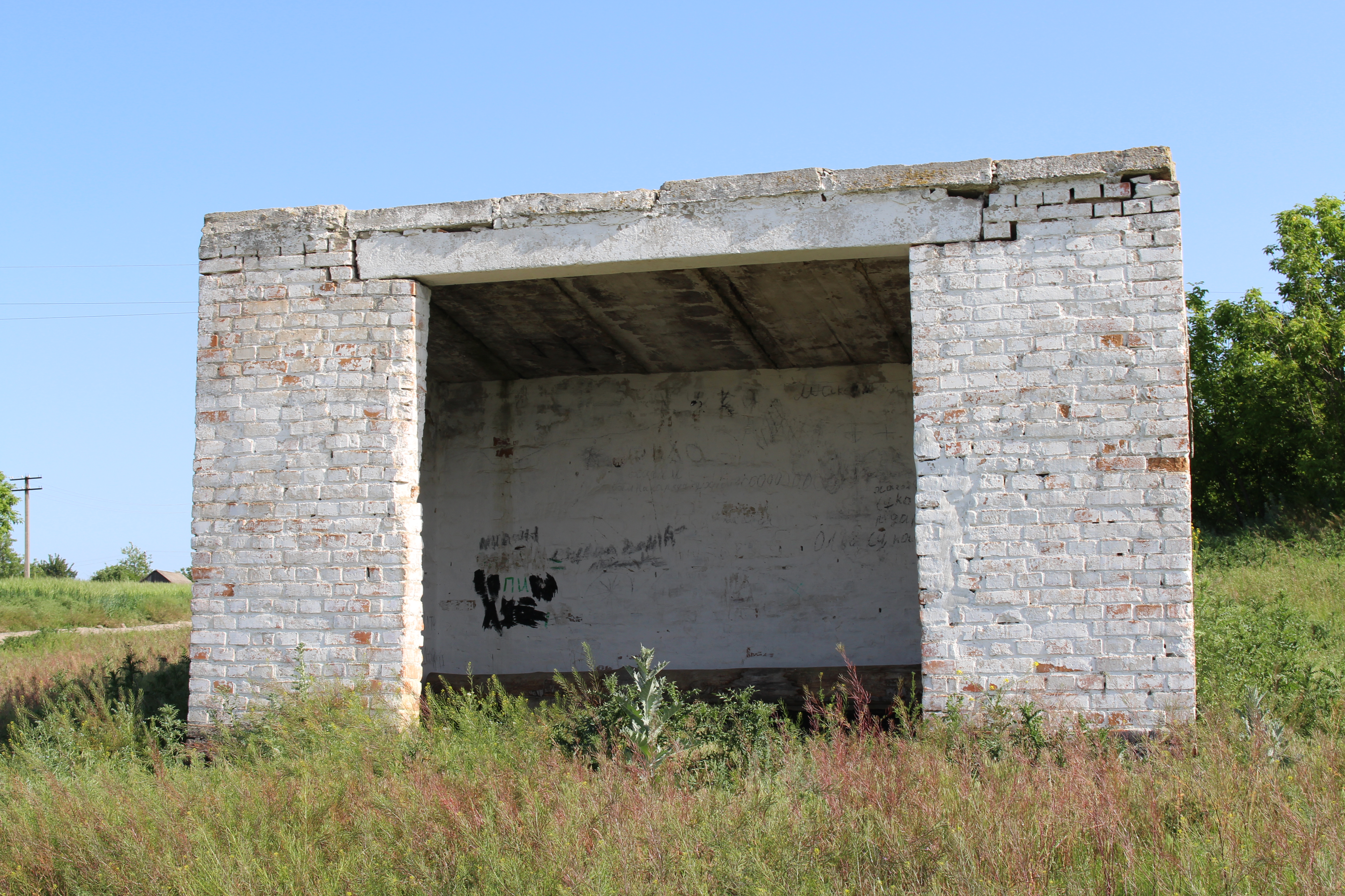 Старенька автобусна зупинка